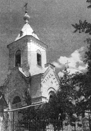 Одигитриевская церковь в станице Аксайской, Черкасский округ Области Войска Донского.